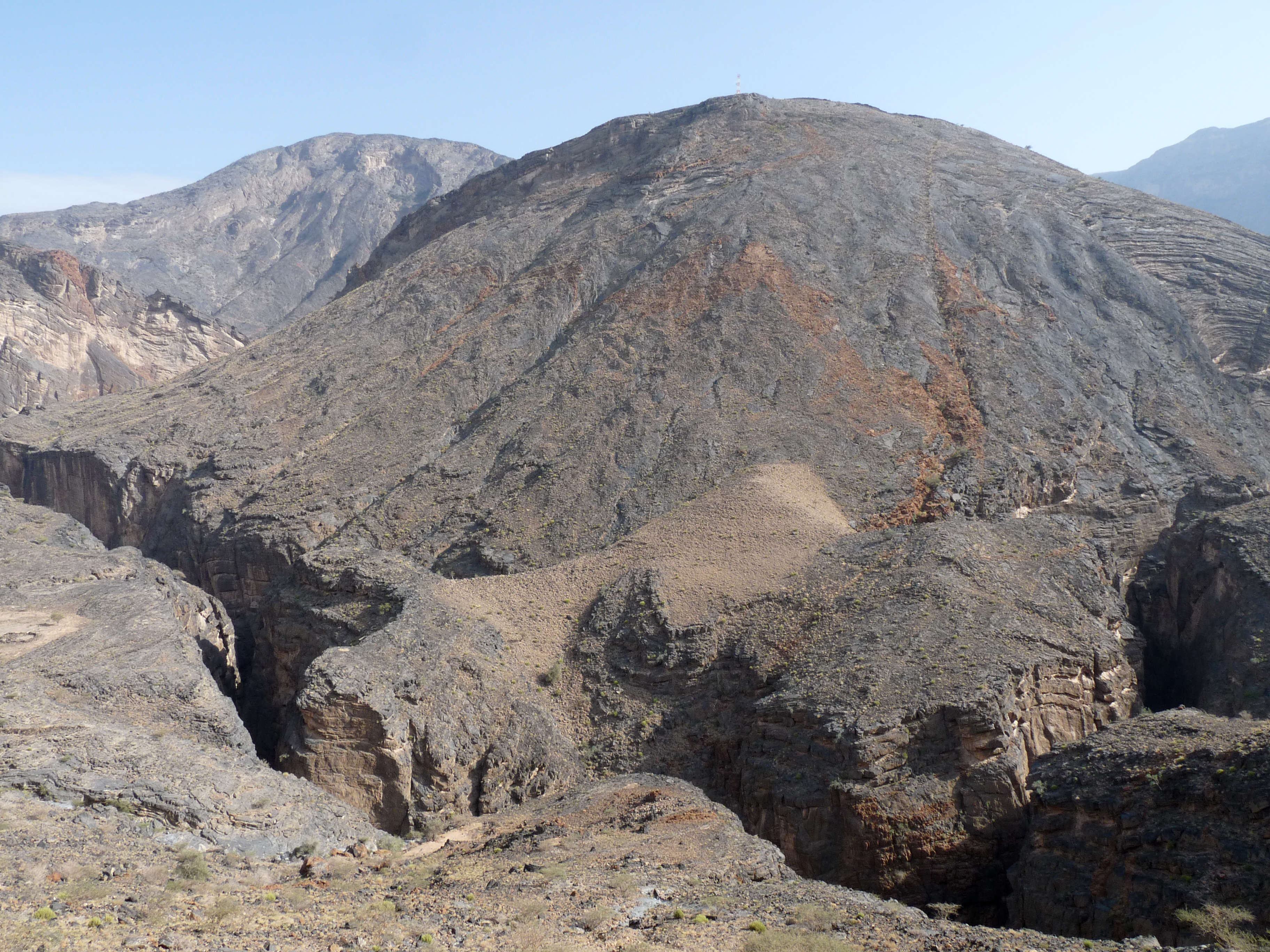 Snake Canyon ou Wadi Bimah (Oman)